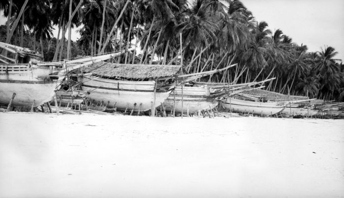 Negatief. Boeginese prauwen liggen tijdens de ongeveer 4 maanden durende Westmoesson op het strand bij Bira, Boeloekoemba, Zuid-Celebes, om gerepereerd te worden